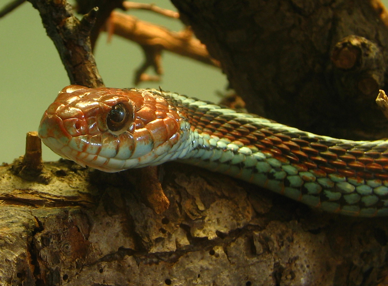 Thamnophis sirtalis tetrataenia (Blijdorp, Zoo (Rotterdam, Netherlands))